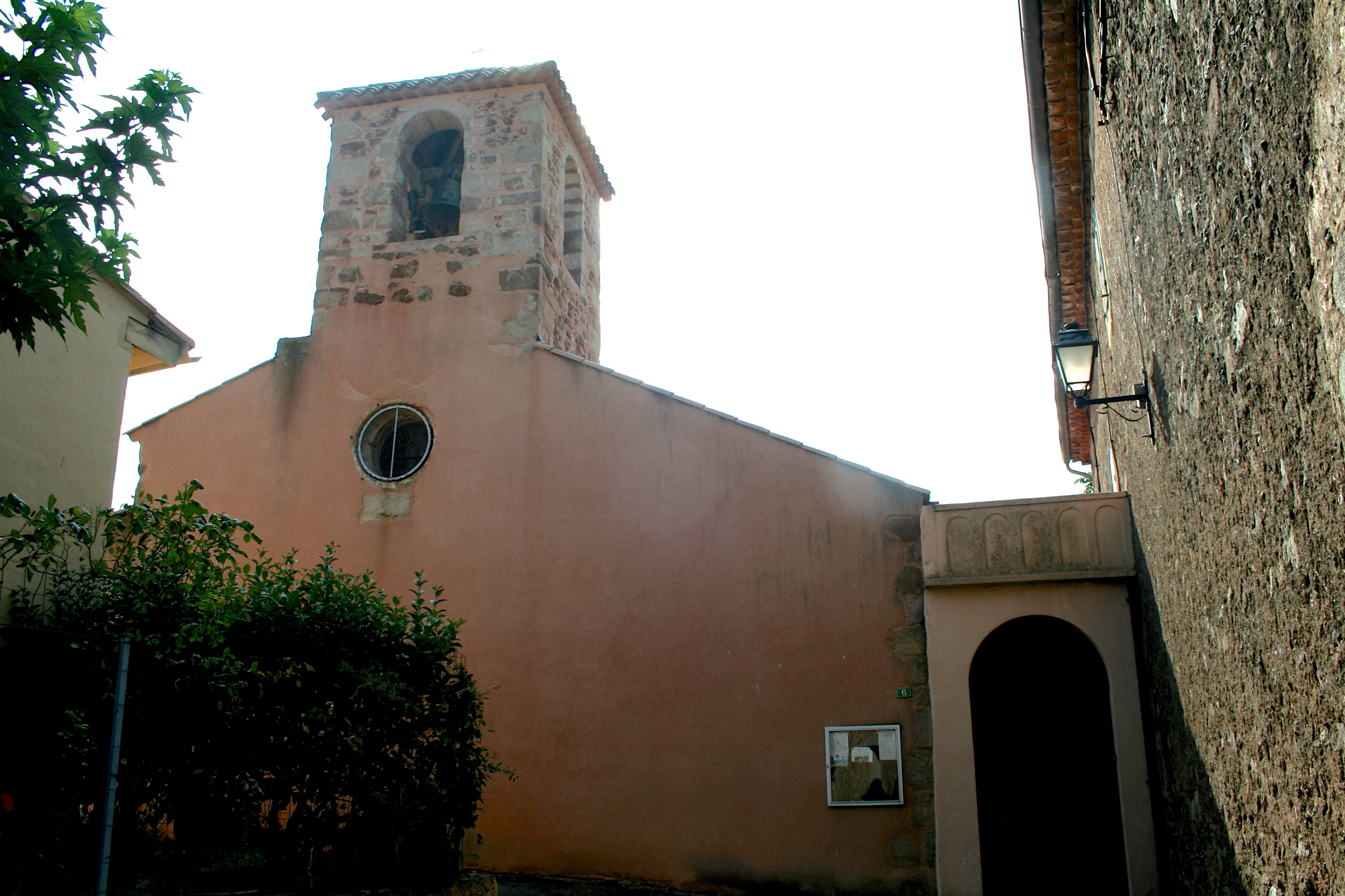 Cébazan (Hérault) - façade de l'église Saint-Martin